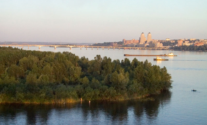 Острів зелений на території міста Дніпропетровська, вид з лівогоберега.